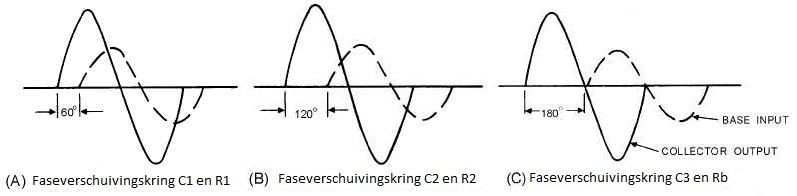 Faseverschuiving